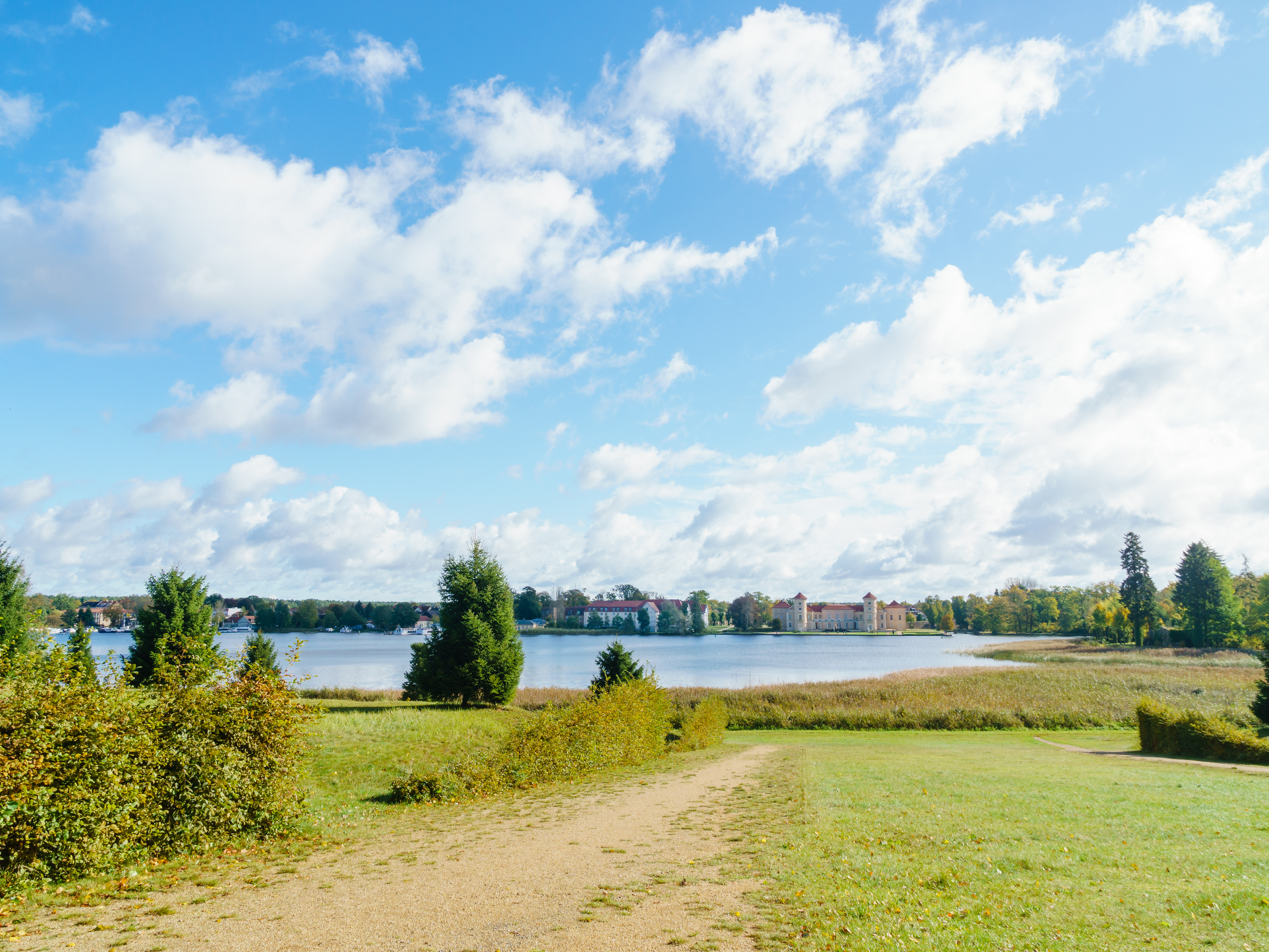 Blick über den Grienericksee zum Schloss Rheinsberg in Rheinsberg